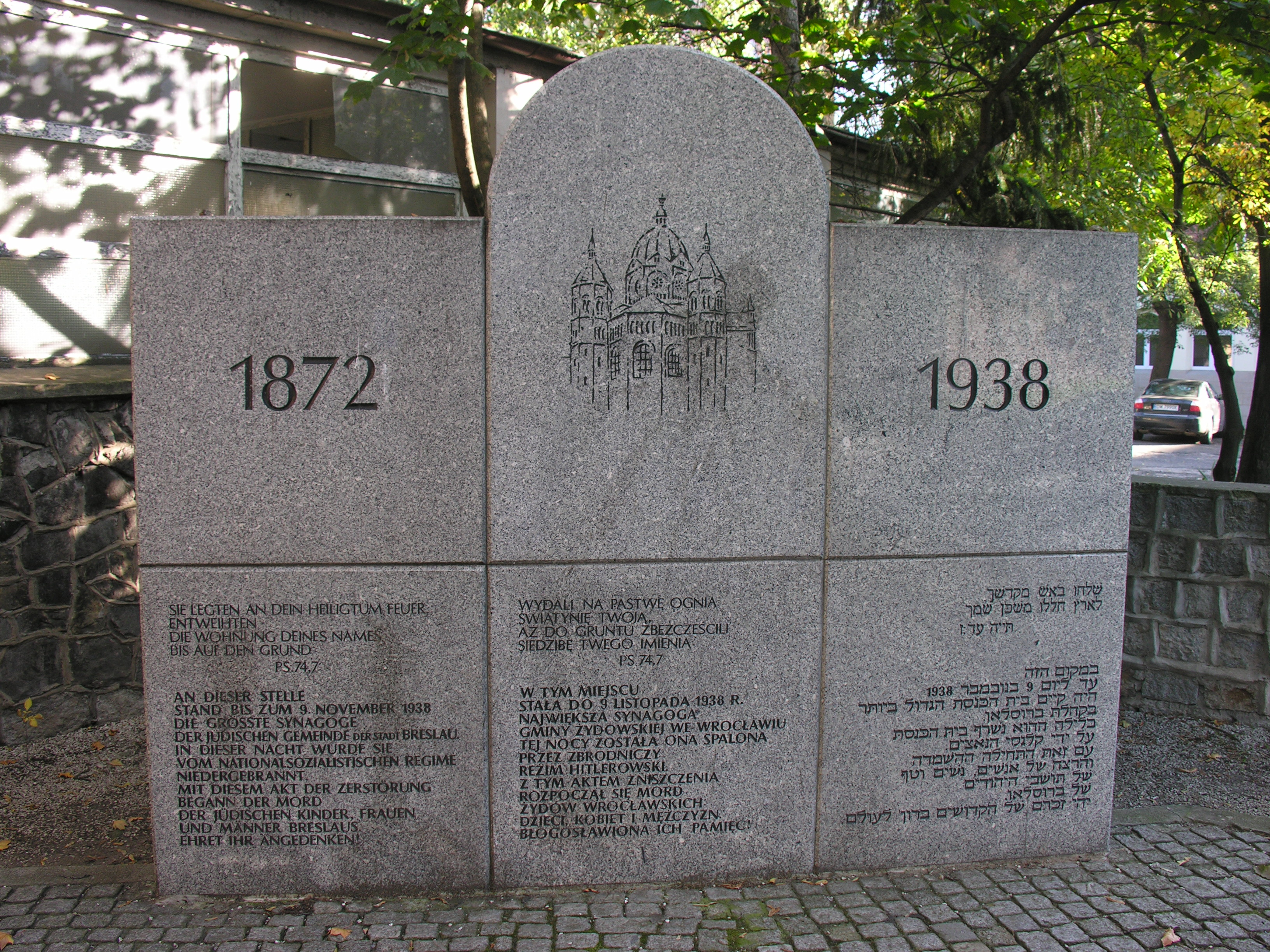 Tablica na miejscu Nowej Synagogi przy ul. Łąkowej we Wrocławiu.